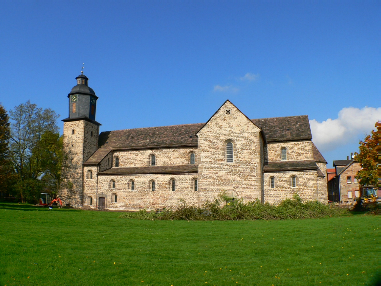 ev. Kirche, ehemalige Klosterkirche zu Lippoldsberg